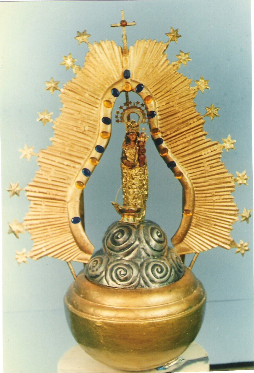 Imagen de Nuestra Señora de la Candelaria, Patrona de El Banco (Magdalena)